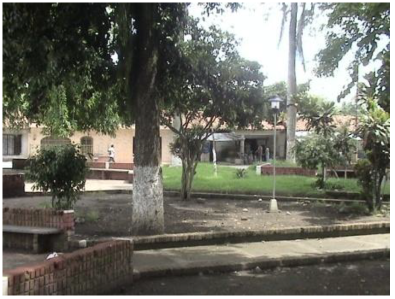 Parque del Corregimiento del Tiple - Municipio de Candelaria